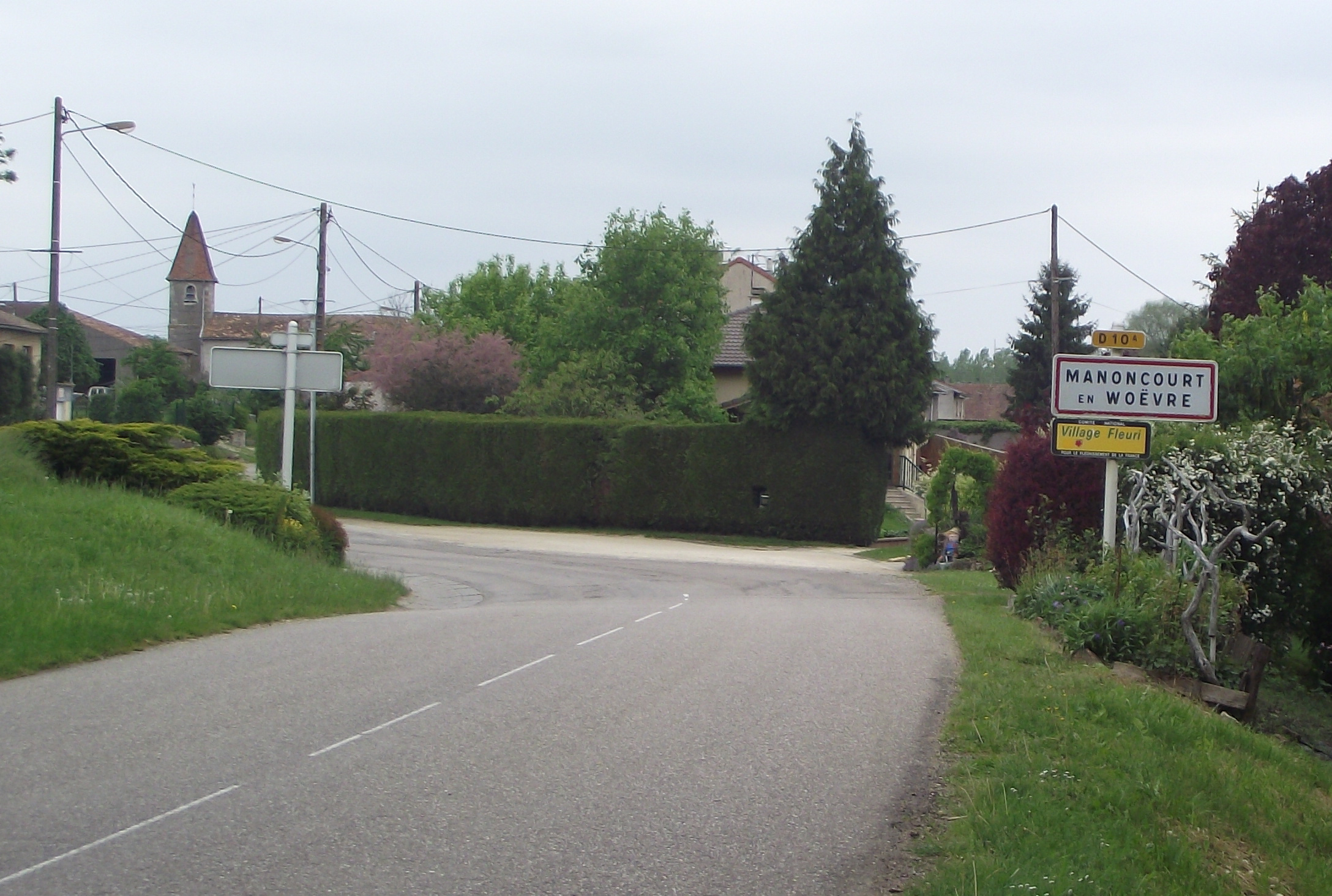 Entrée du village de Manoncourt-en-Woevre